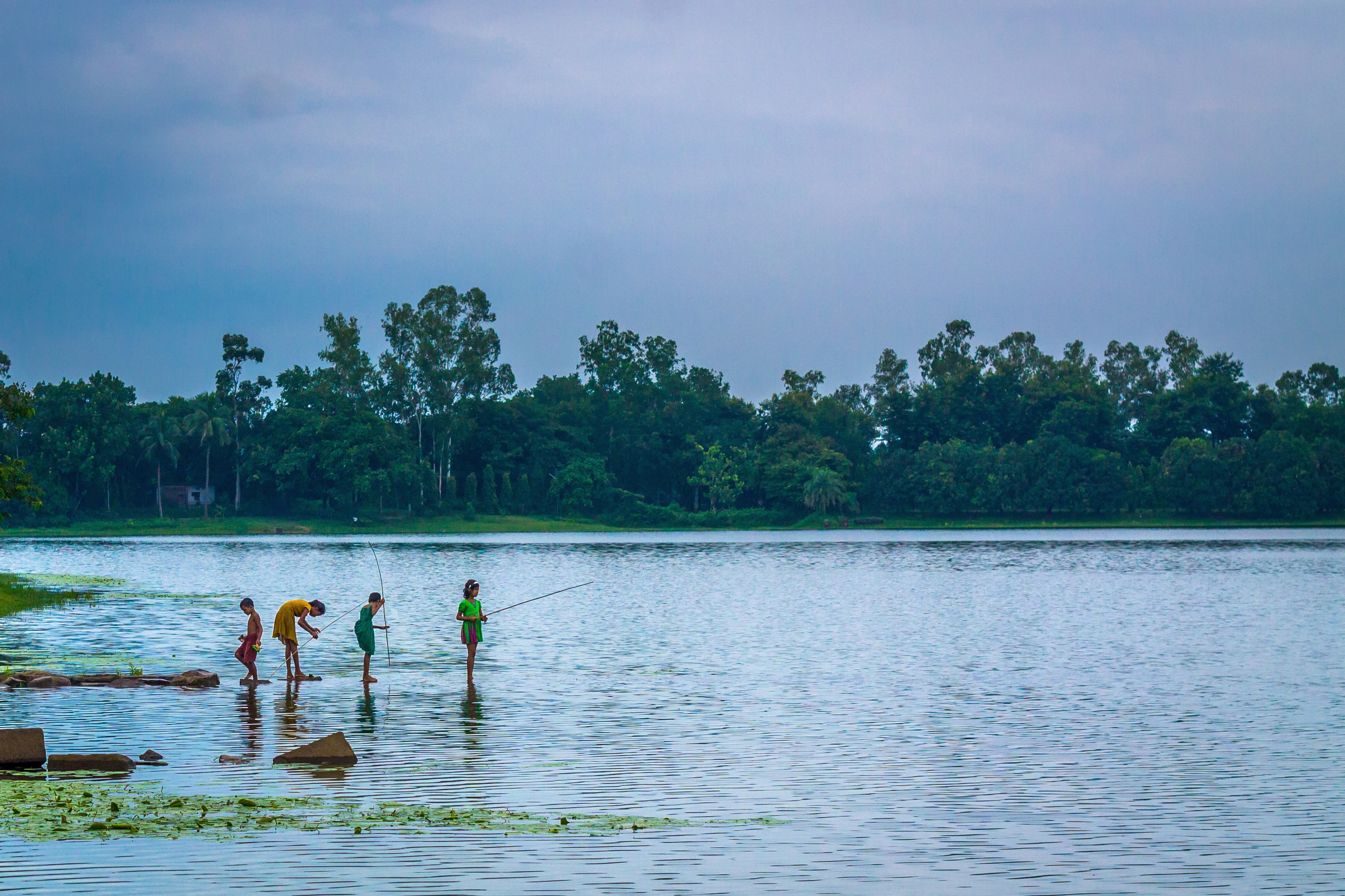 রামসাগর জাতীয় উদ্যান